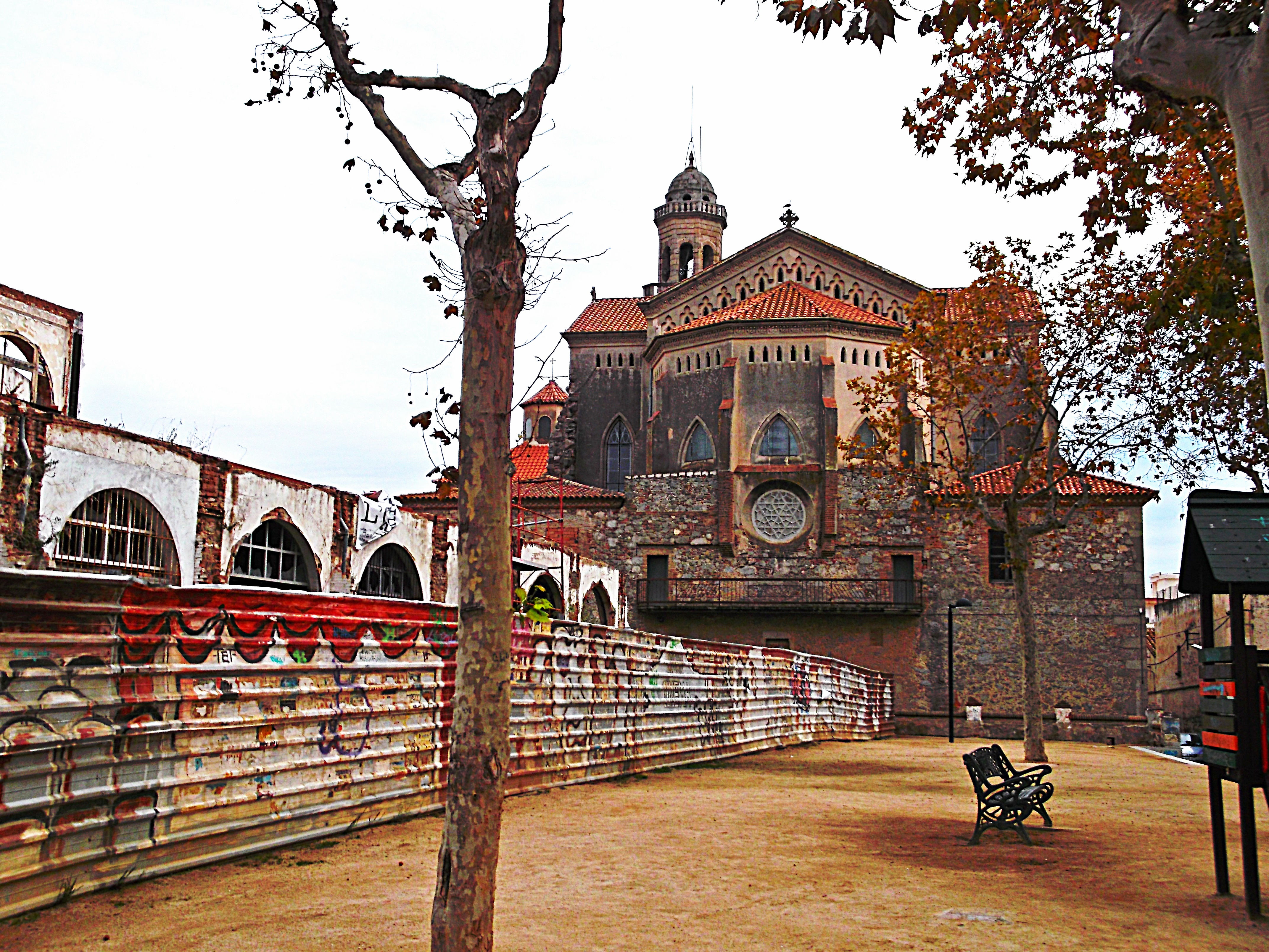 L'esglèsia des de darrere i l'Odèon.